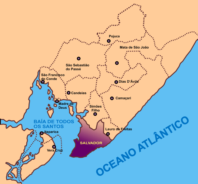 Mapa da Região Metropolitana de Salvador ( Bahia, Brazil)